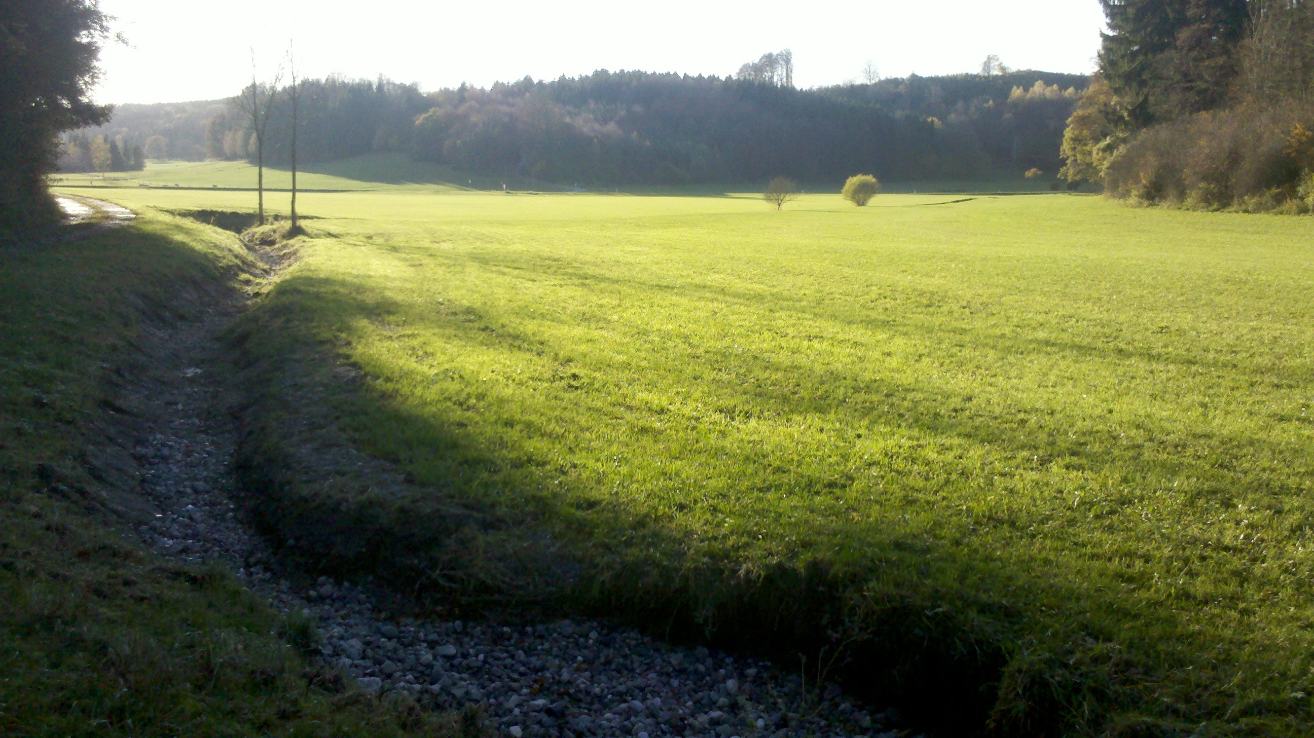 Quellgebiet Kupferbach